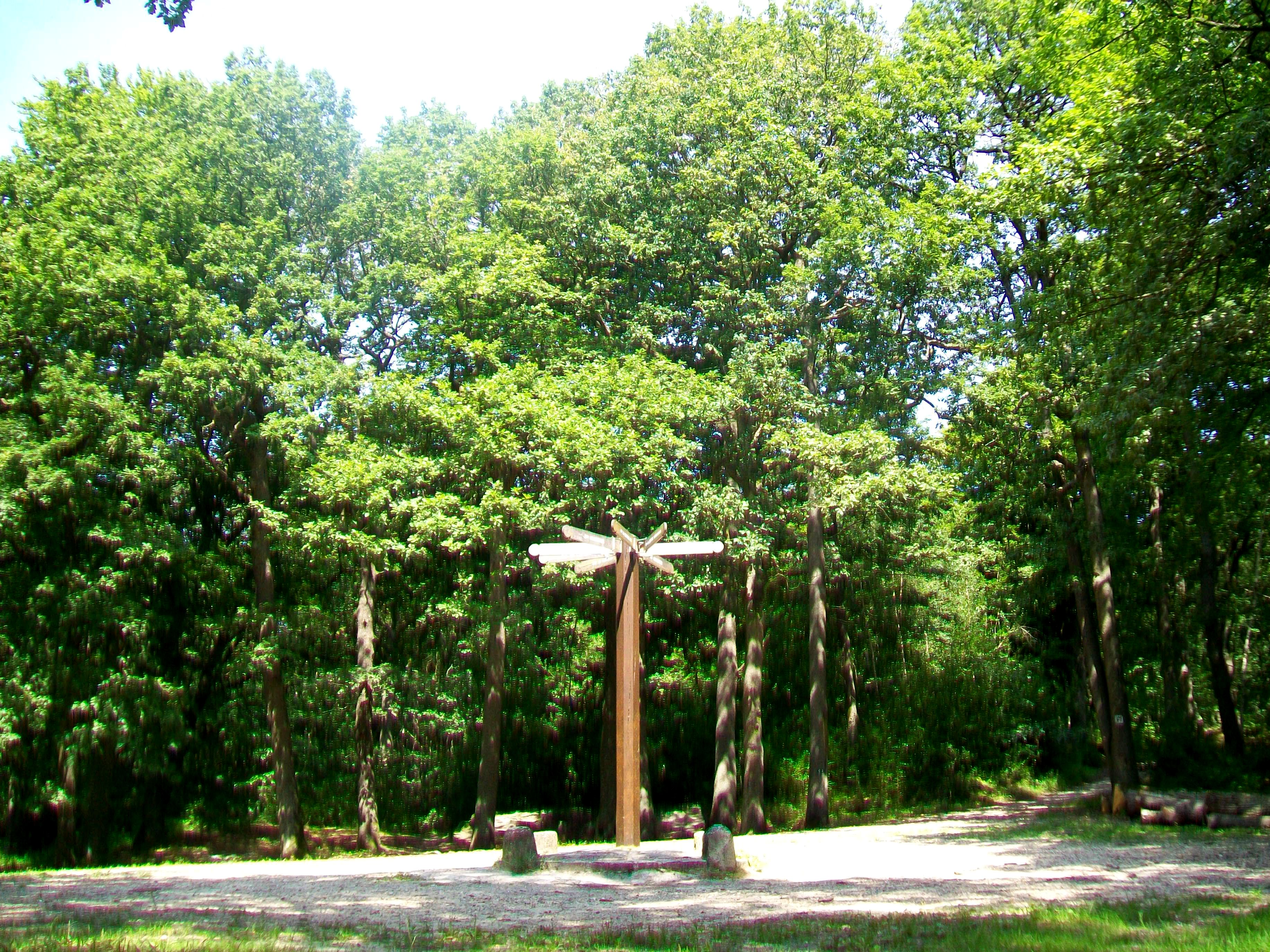 Le carrefour du poteau de la Tour, parcelles 38 à 43.